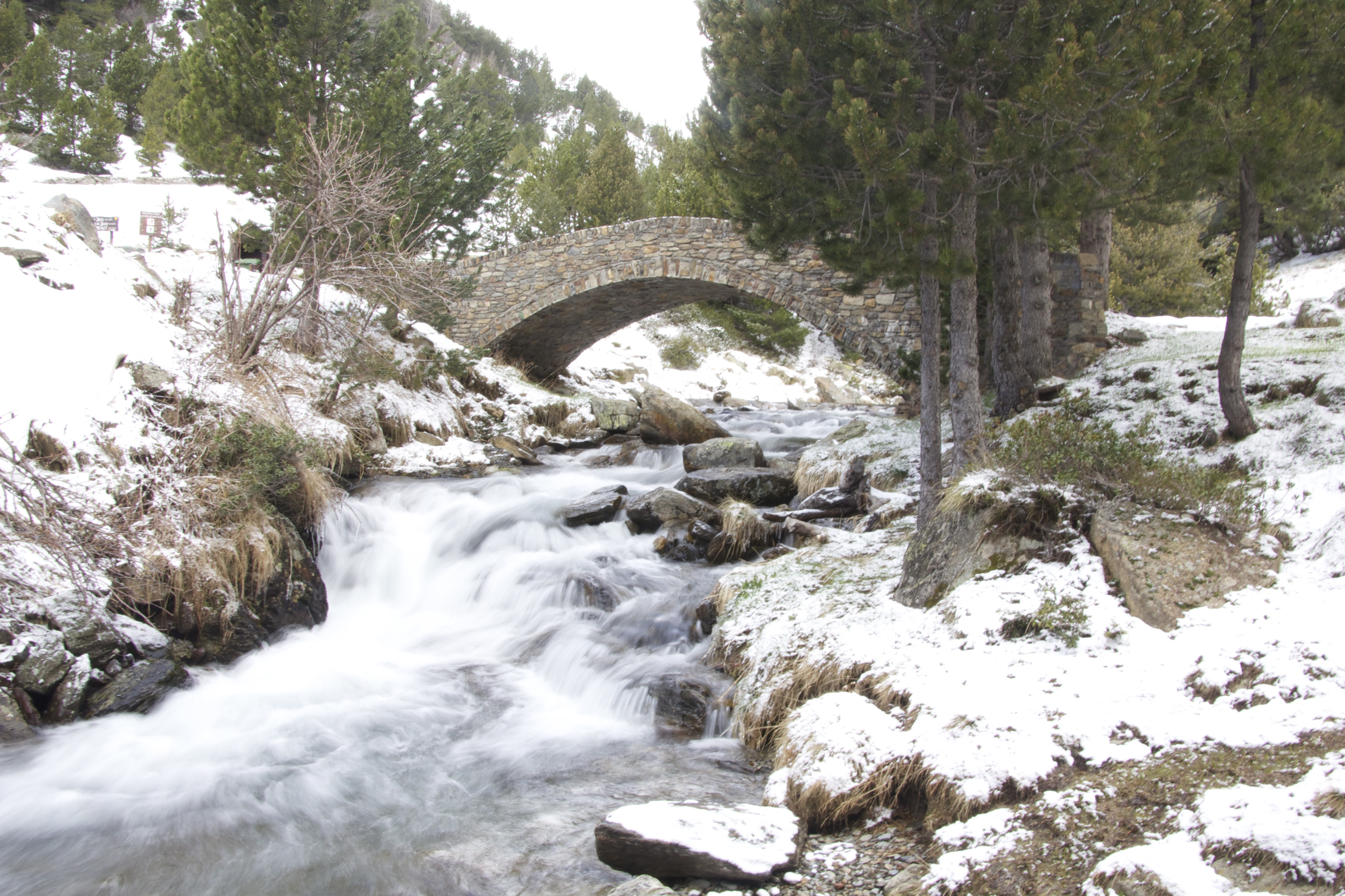 Riu de la Coma This is a a photo of a river in Andorra with id: IEA-R-31